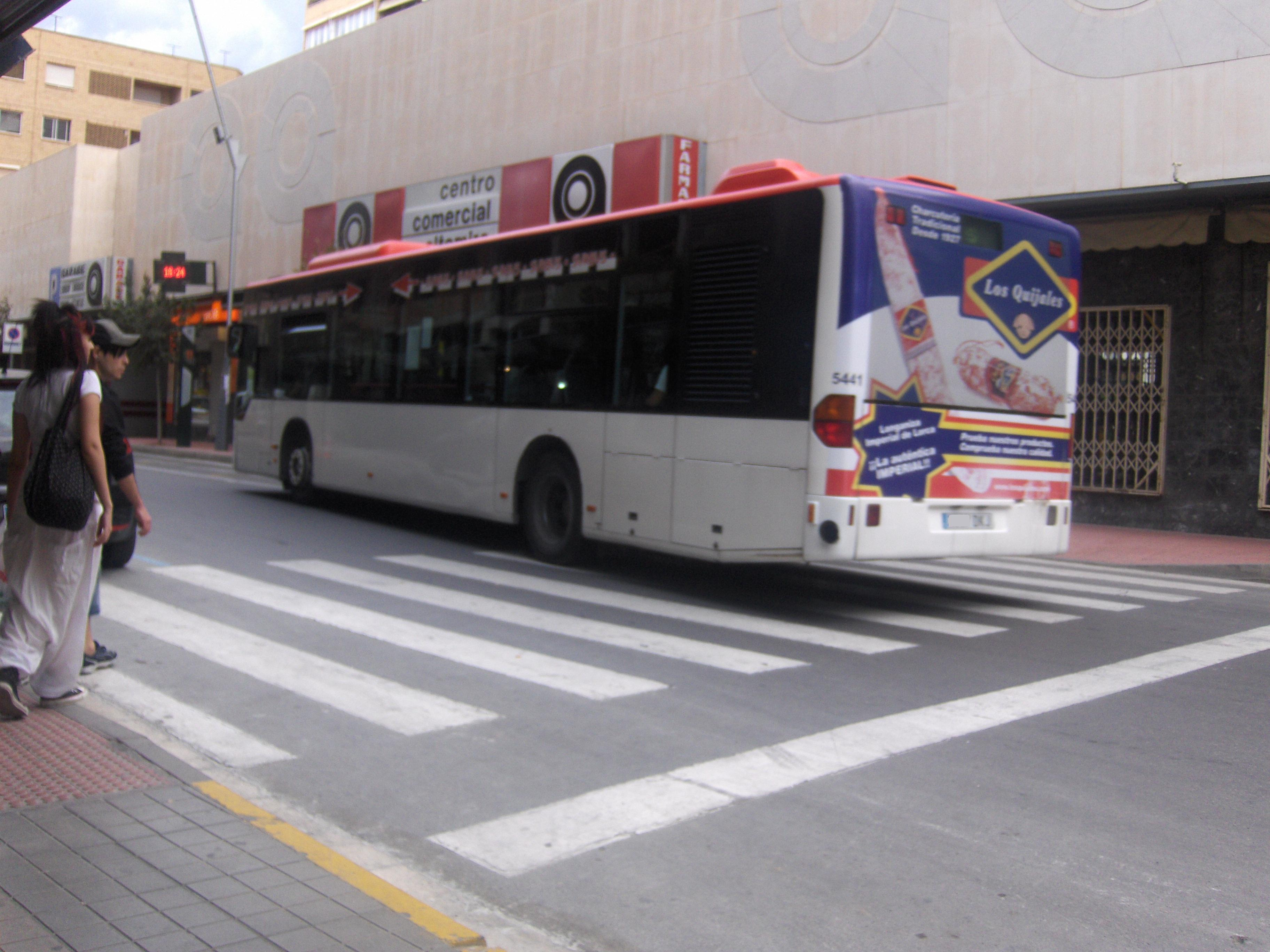 Autobús en la ciudad de Almería